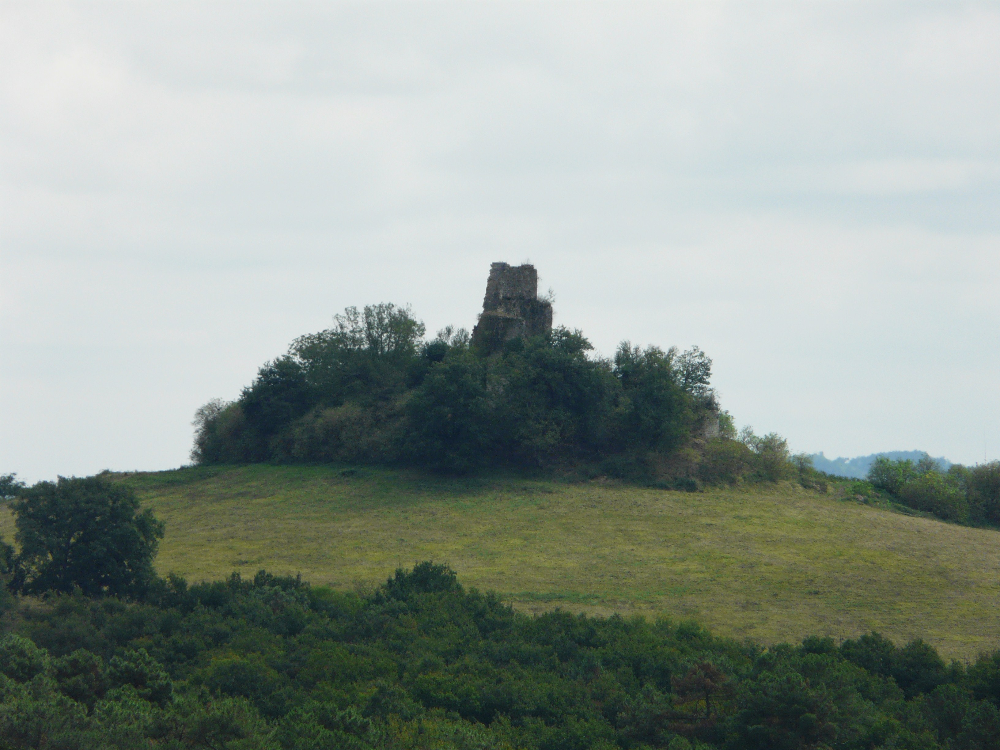 Les ruines du château de Gurson, Carsac-de-Gurson, Dordogne, France.